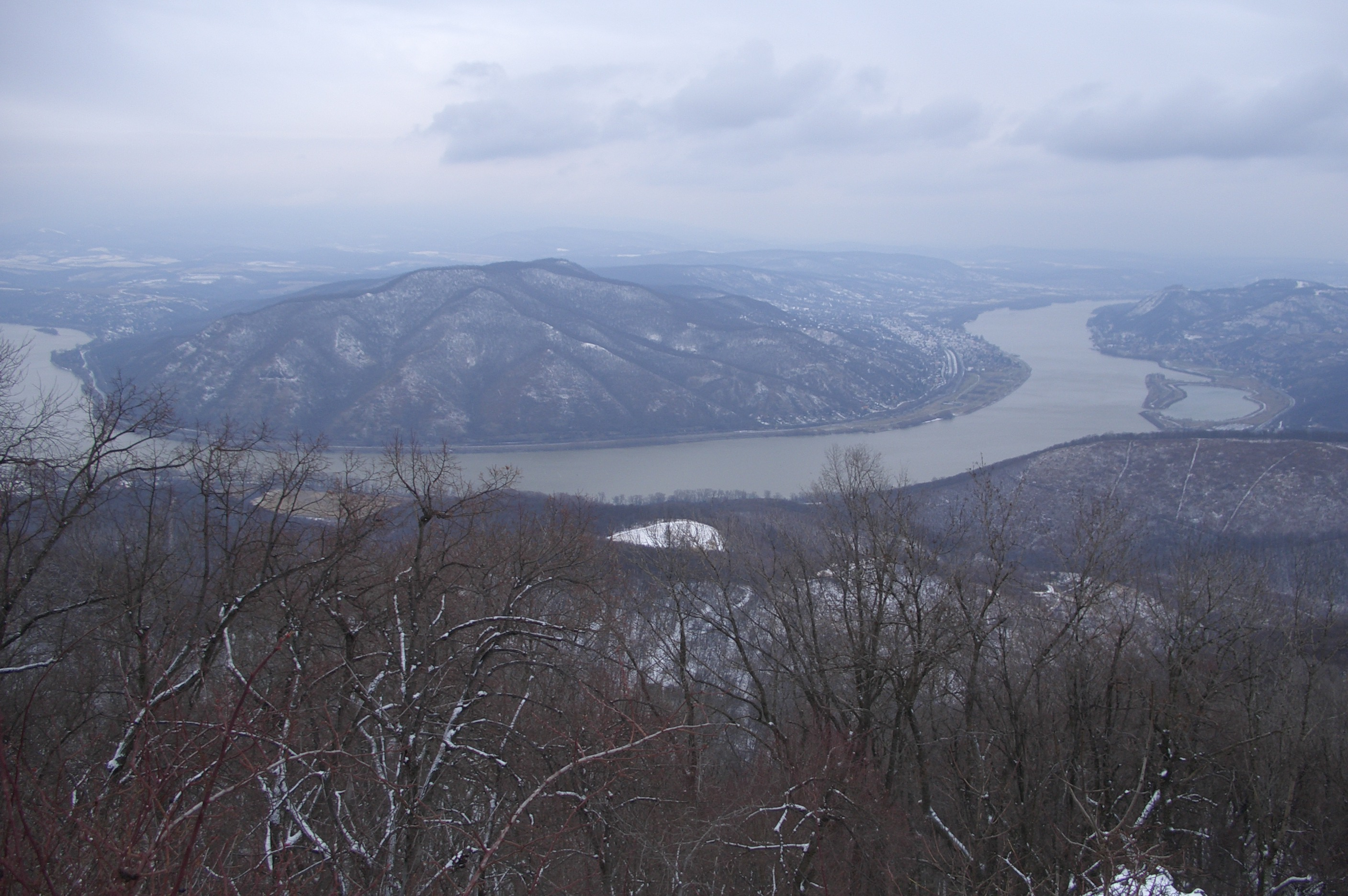 A Dunakanyar télen a Prédikálószékről